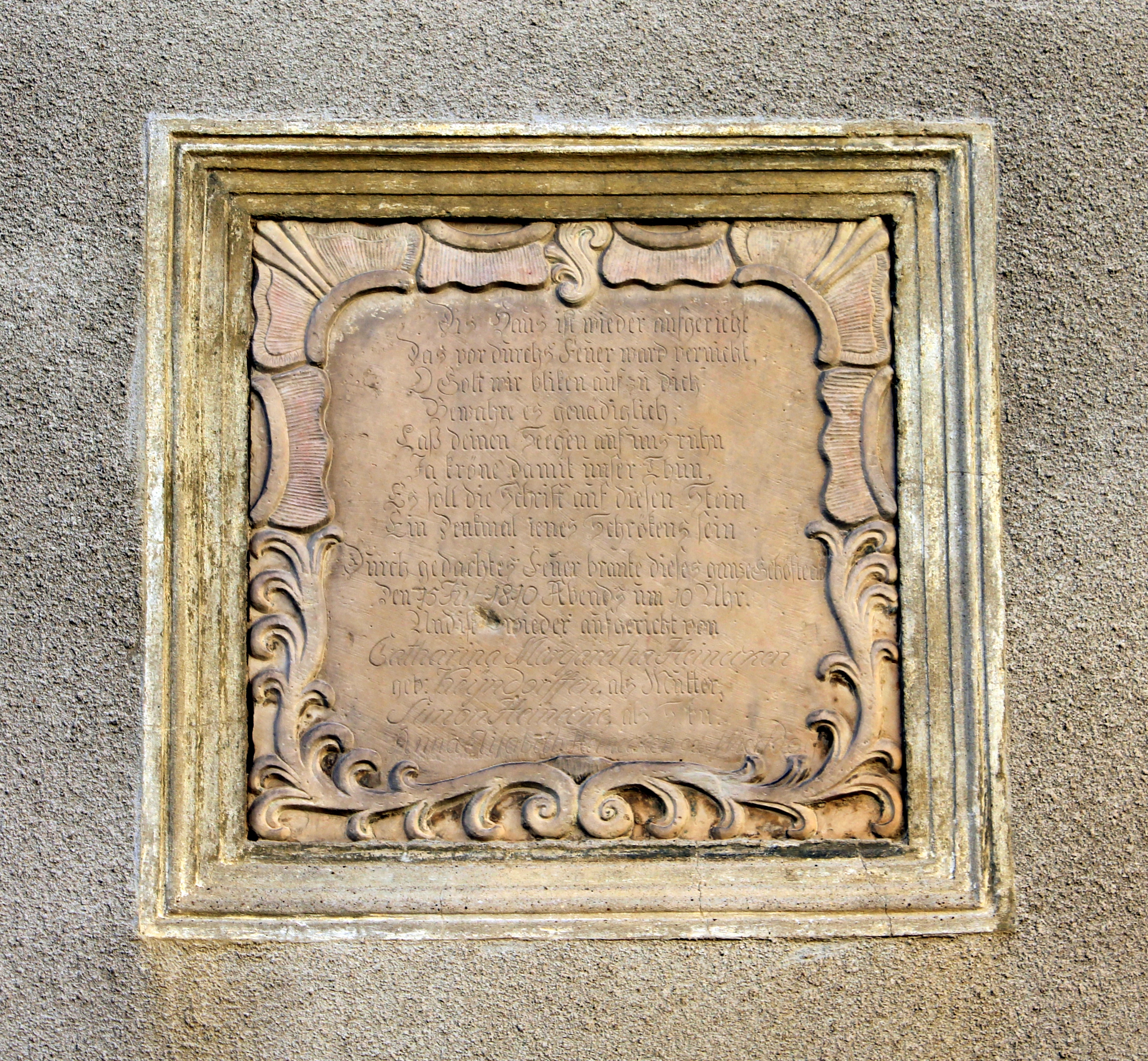 Inschriftenstein Kirchstraße 23, Ebendorf